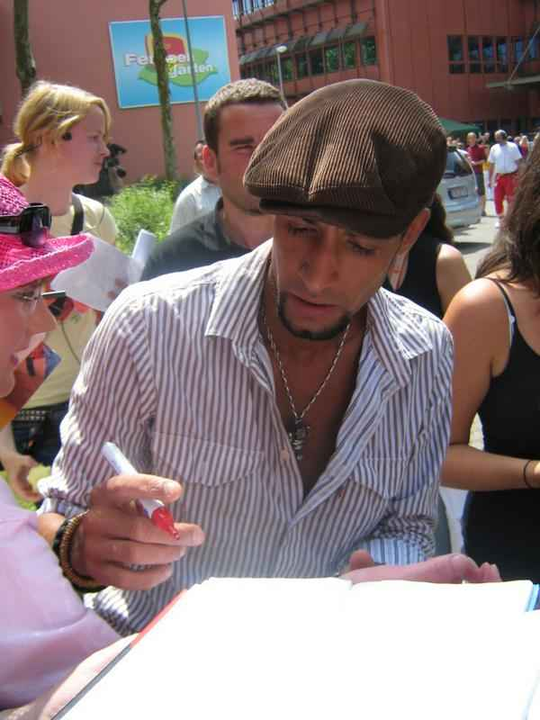 Mark Medlock gibt Autogramme beim ZDF Fernsehgarten